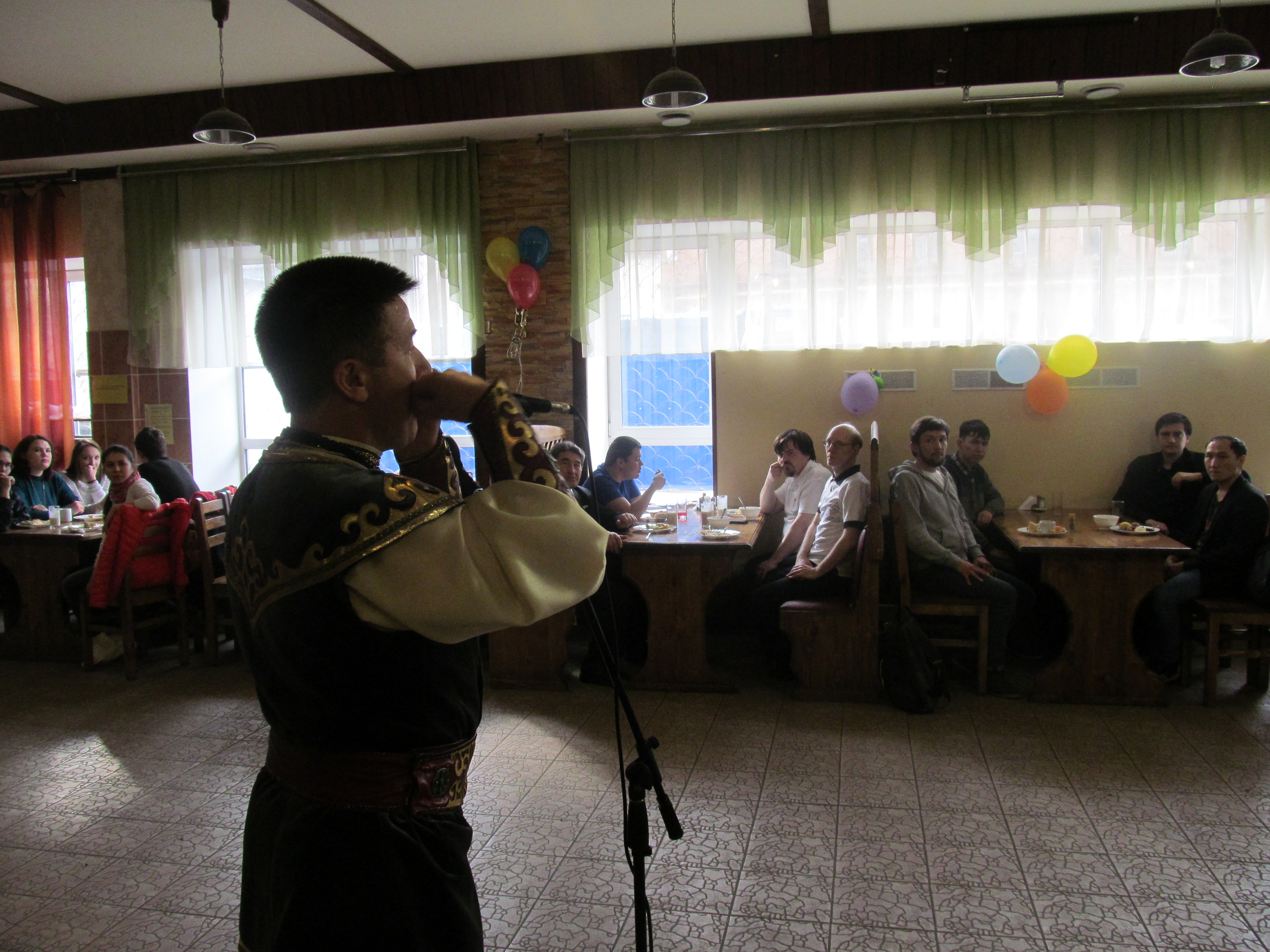 Башҡортса: Миңлеғәфүр Зәйнетдинов (Башҡортостандың атҡаҙанған мәҙәниәт хеҙмәткәре, виртуоз музыкант, ҡумыҙсы) Вики-һабантуйҙа сығыш яһай.